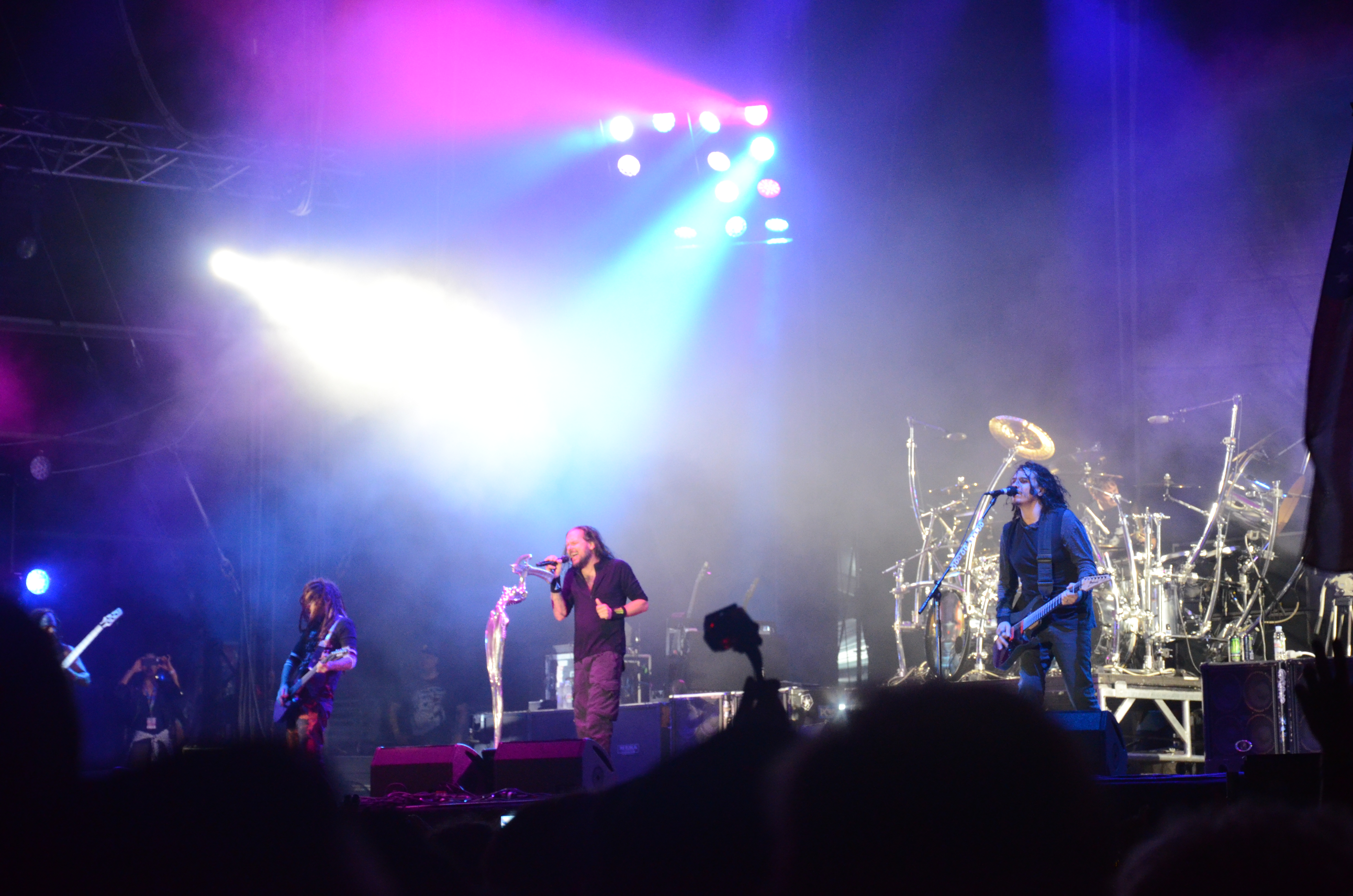 Korn treedt op tijdens Szigetfestival 2014.